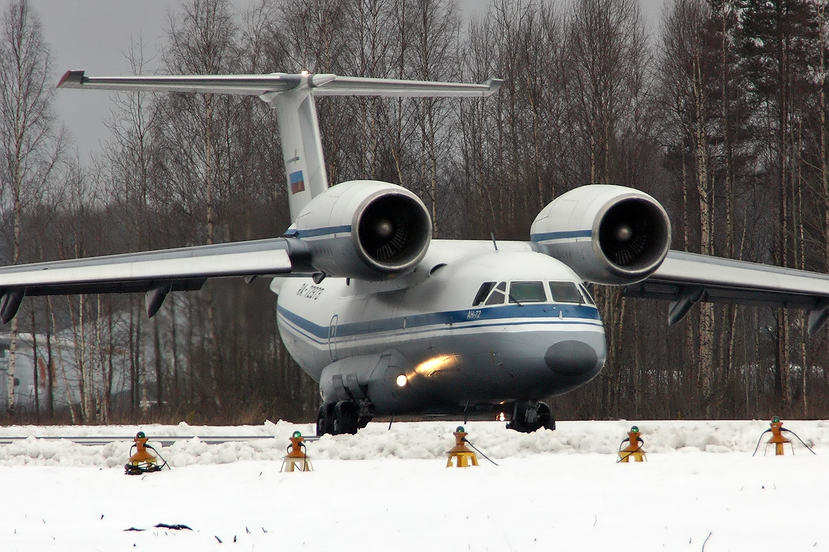 Russian Navy Antonov An-72